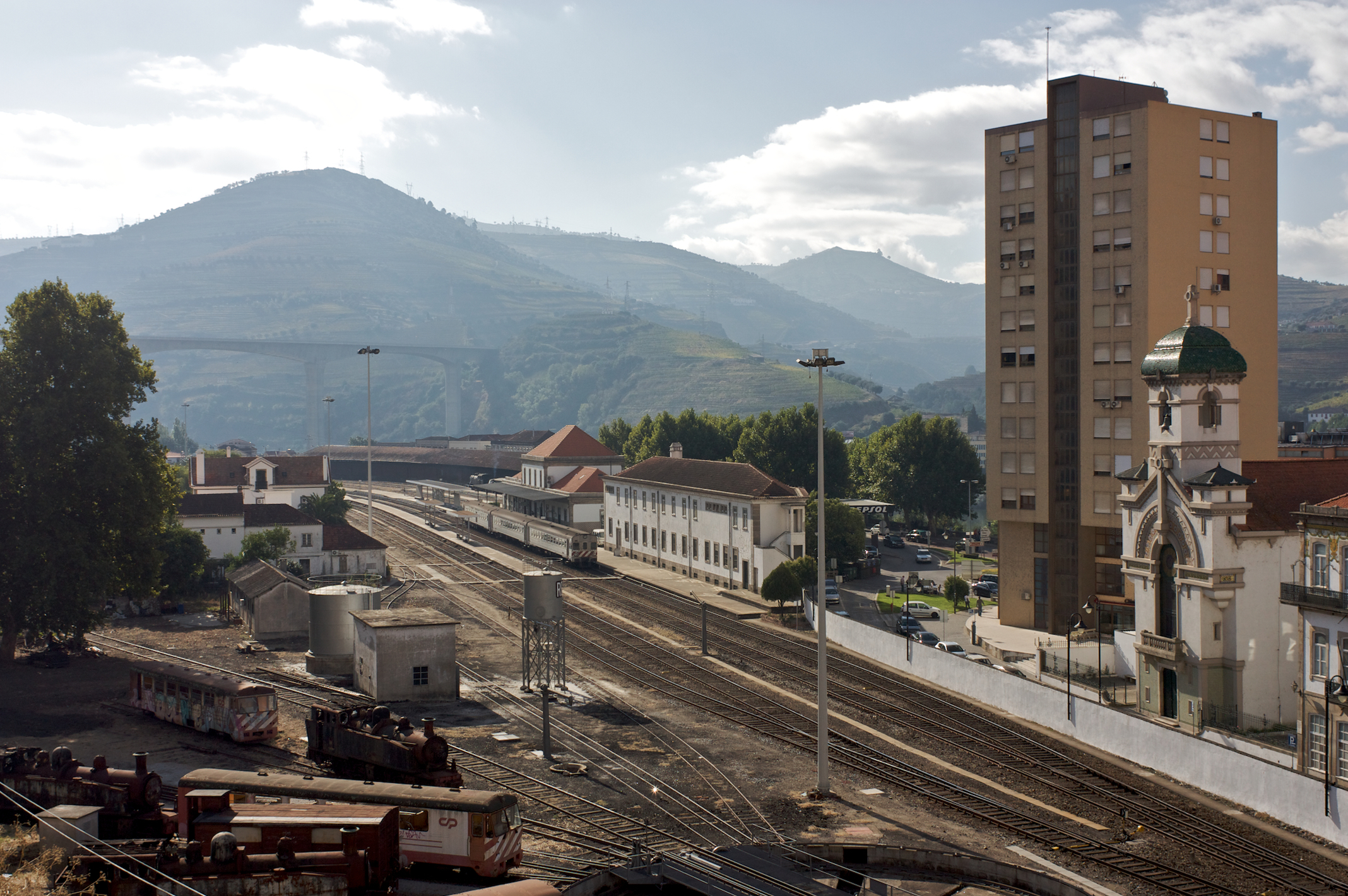 Tipo: E [Estação] Local: Peso da Régua Linha do Douro, PK 103 • Linha do Corgo, PK 0,0] Data e hora: 2 de Outubro de 2010 [10h20]